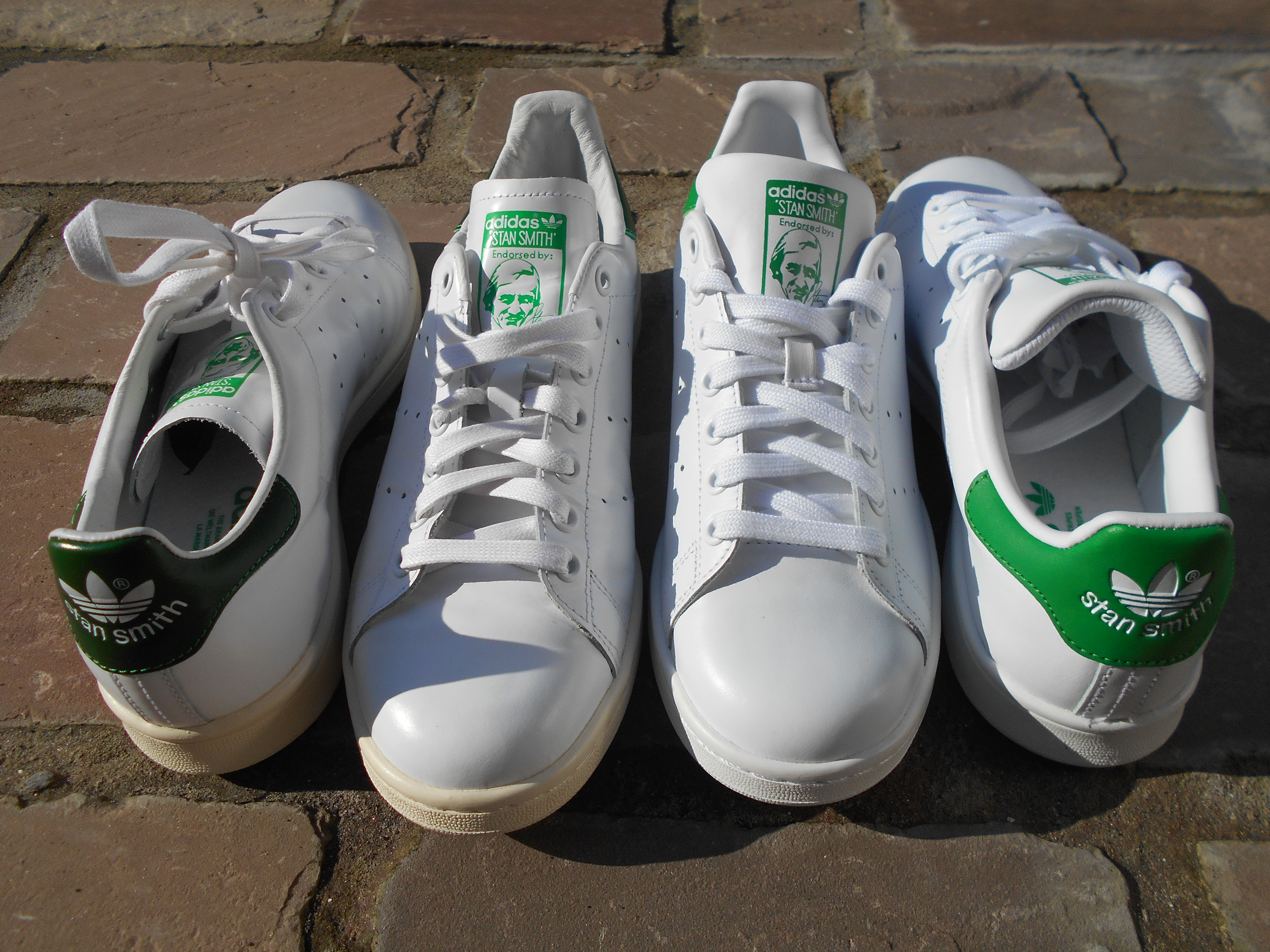 Différences entre Adidas Stan Smith Vintage et Adidas Stan Smith 2015